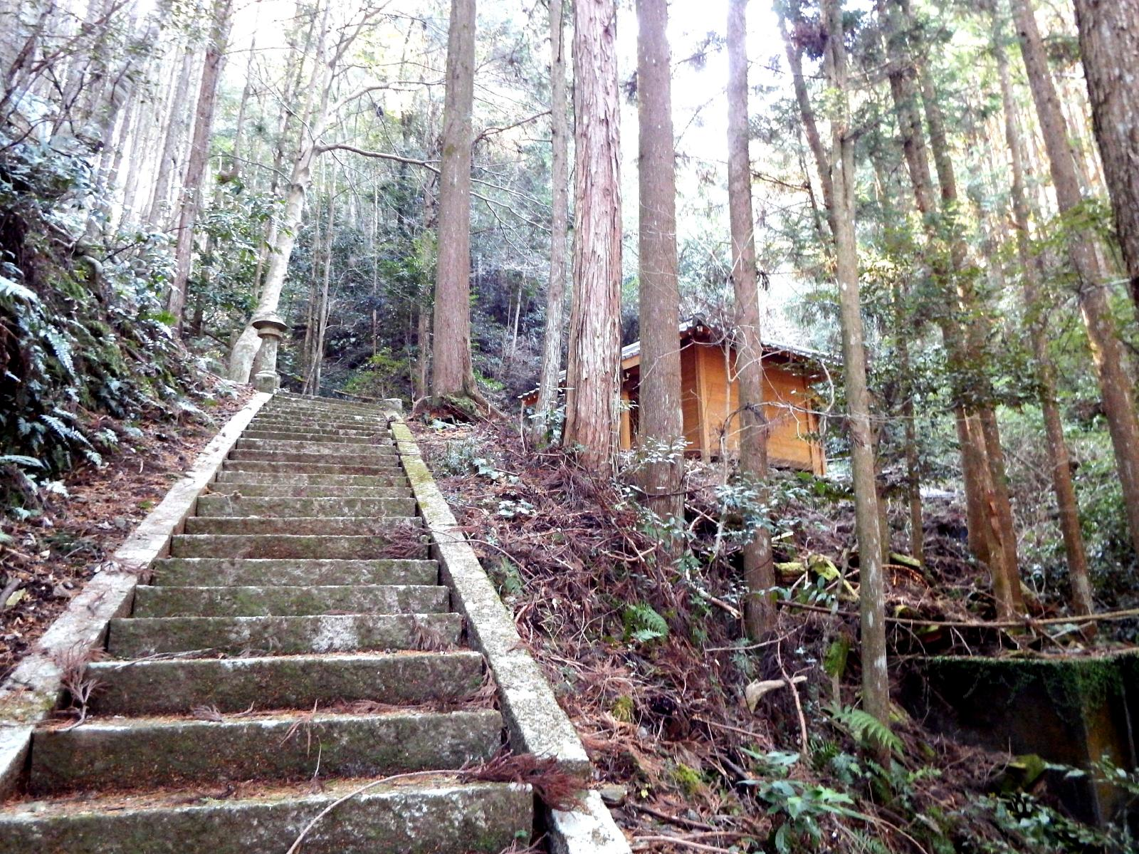 歓喜光寺の権現堂